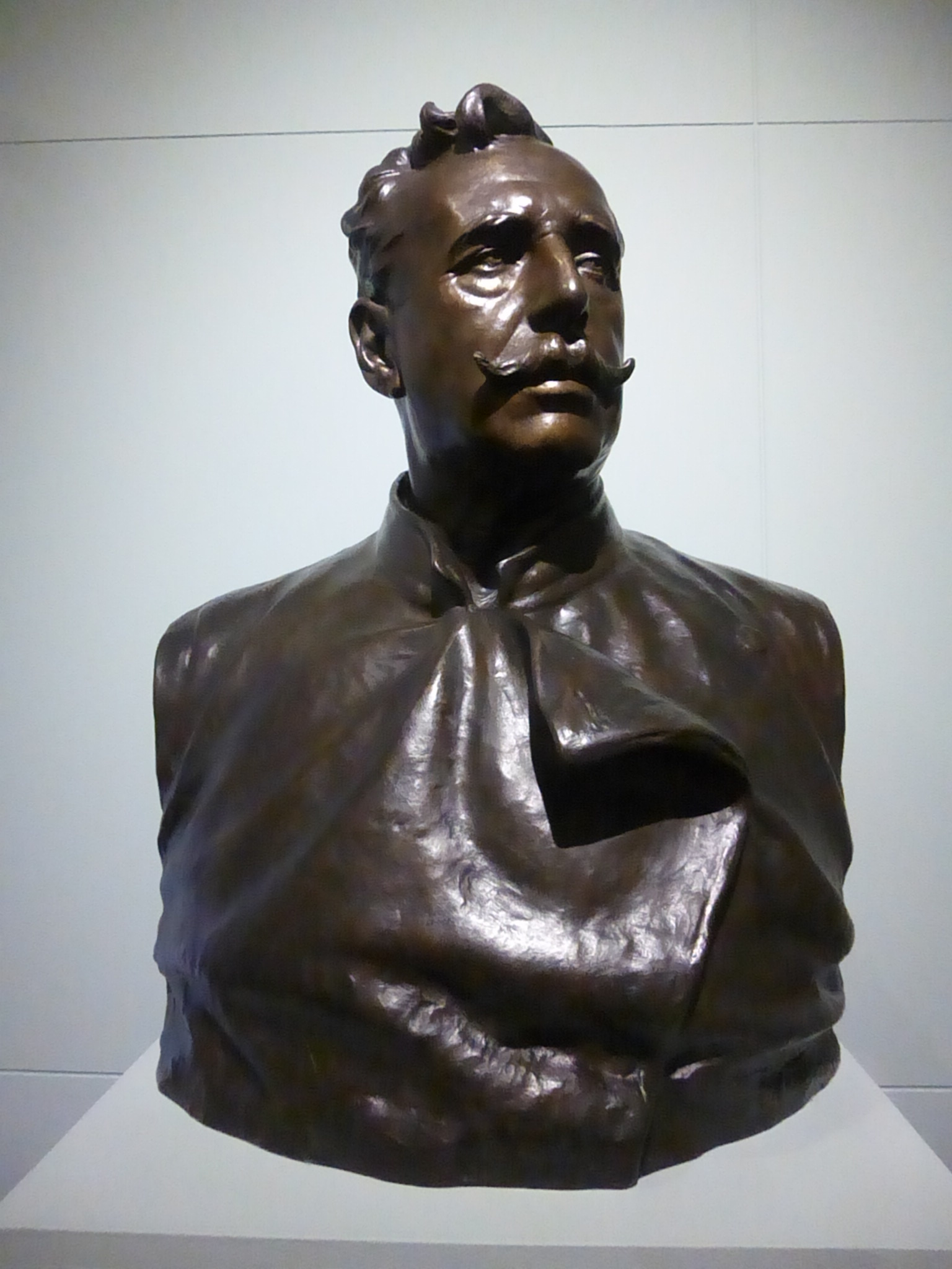 Roma, Galleria comunale d'arte moderna. Ettore Ximenes, autoritratto - bronzo, post 1915